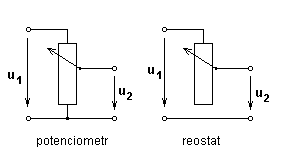 Elektrické schéma potenciometru a rezistoru